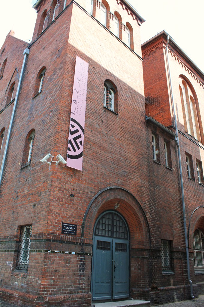 Gdańsk Dolne Miasto, ul. Jaskółcza 1.